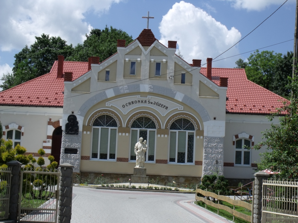 Ochronka św. Józefa w Rymanowie prowadzona przez Siostry Służebniczki z Zakonu Najświętszej Maryi Panny.